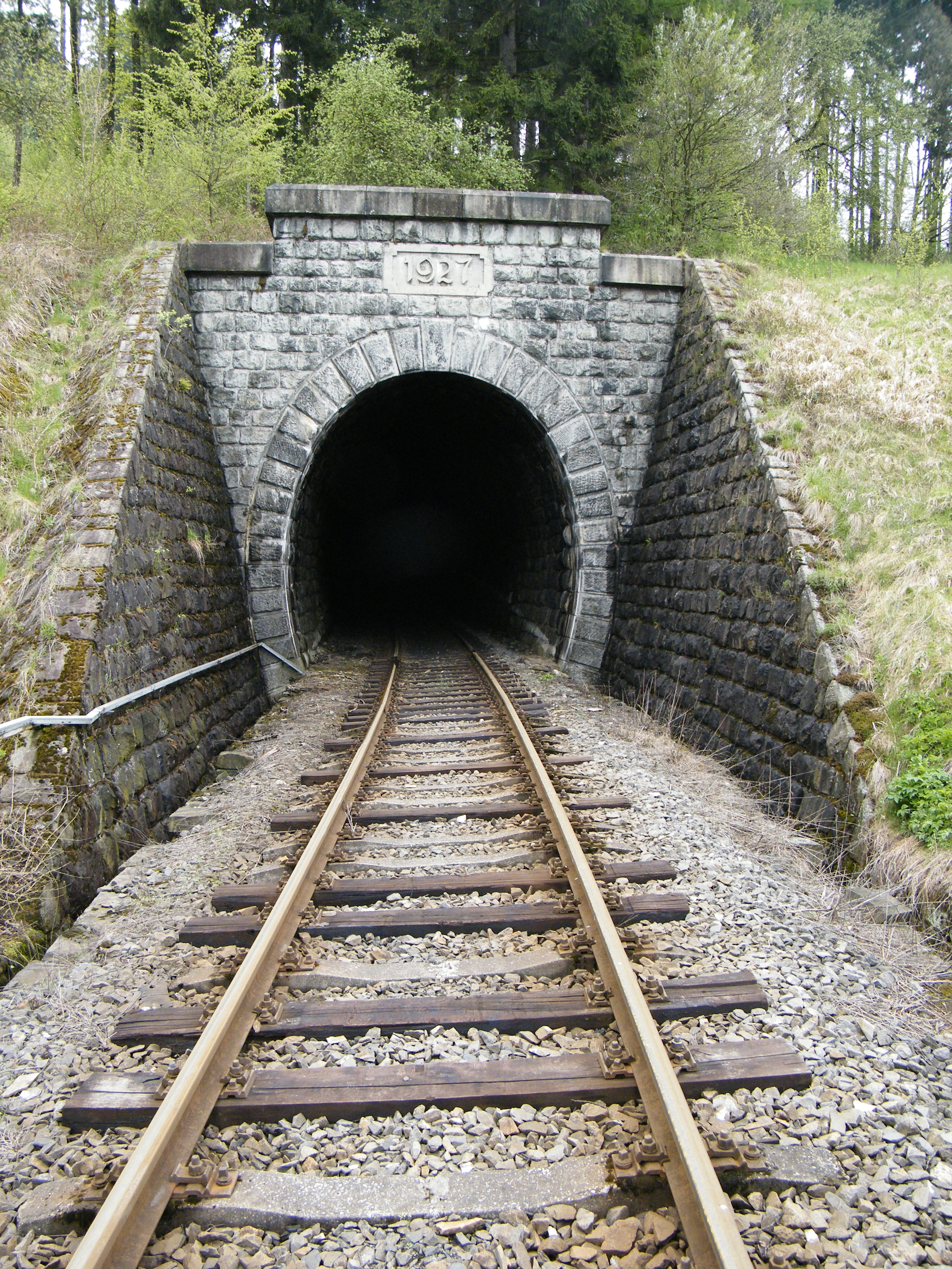 Navojna. Train station and tunnel.